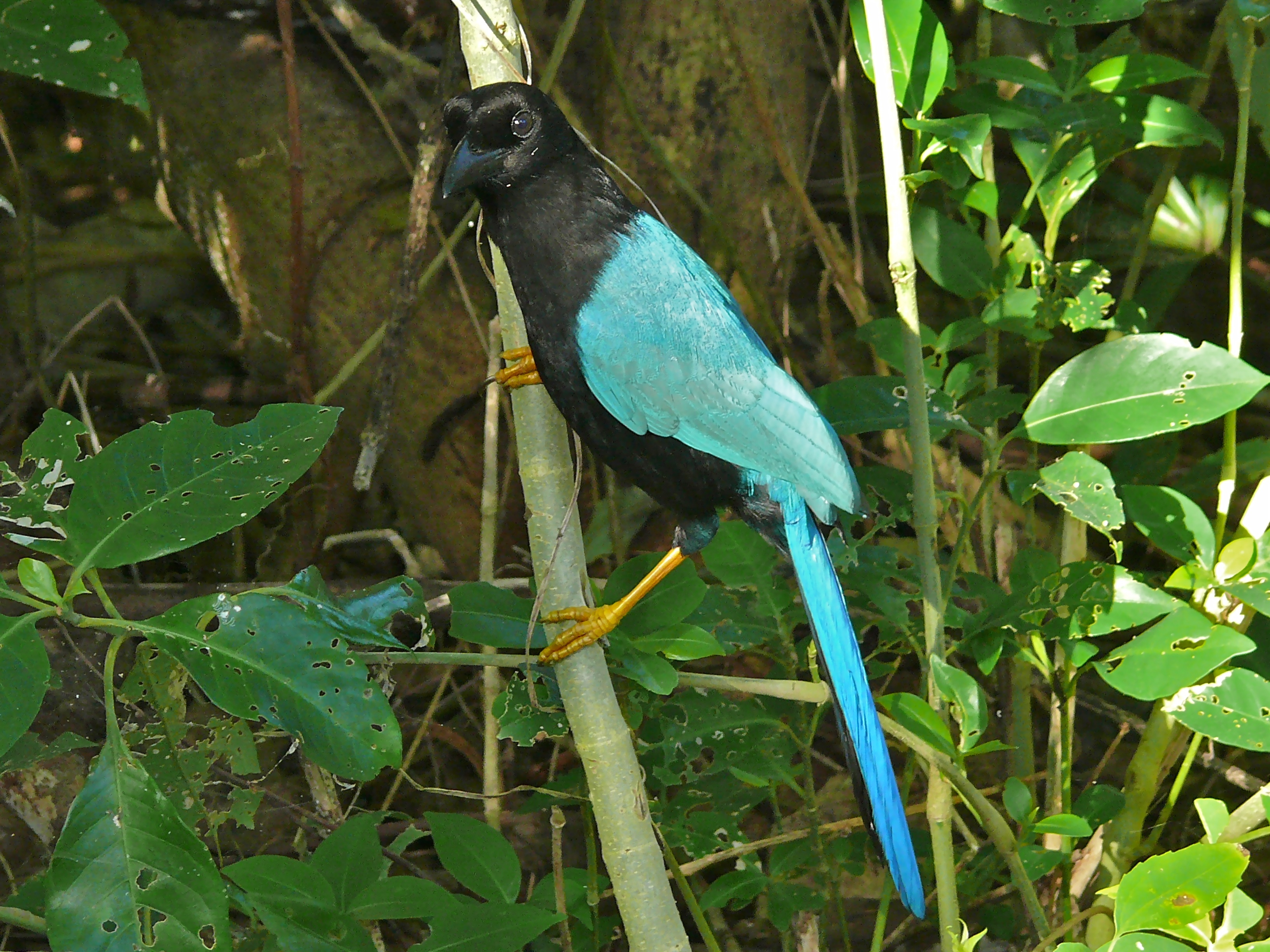 Tulum, Quintana Roo, MEXICO